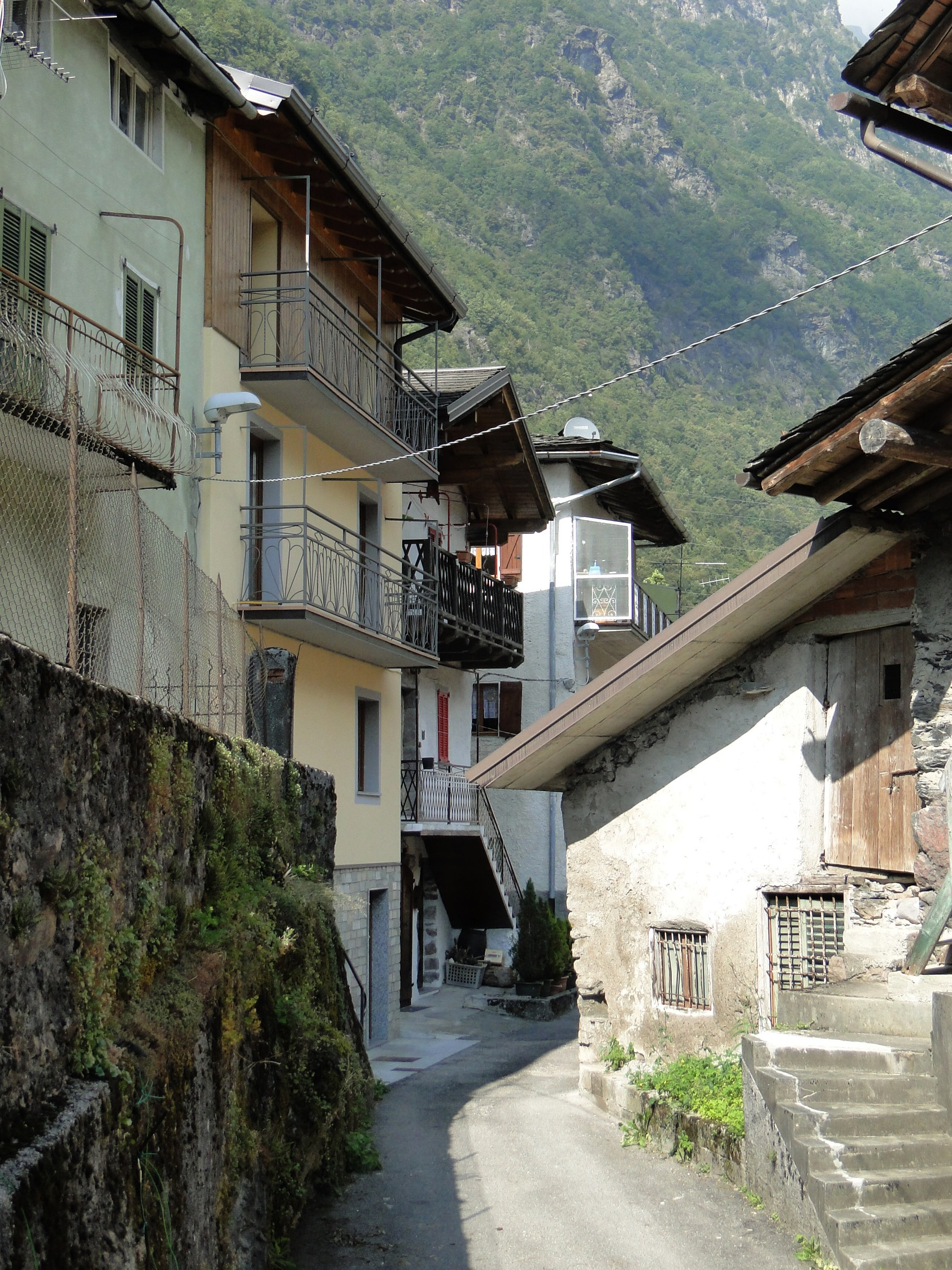 Borgo storico di Fiumenero, fraz. di Valbondione. Valle Seriana (BG)